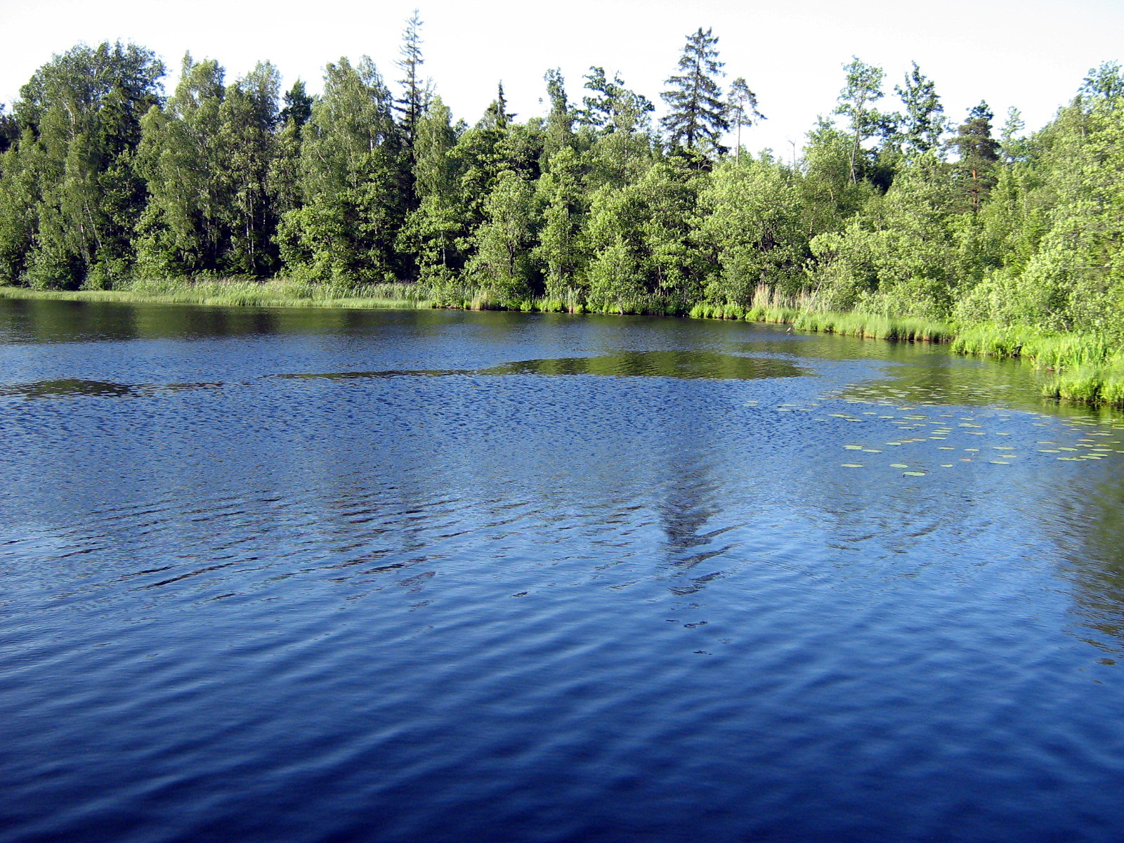 Žemaitėška: Ruškė ežers. Foto:Algėrds